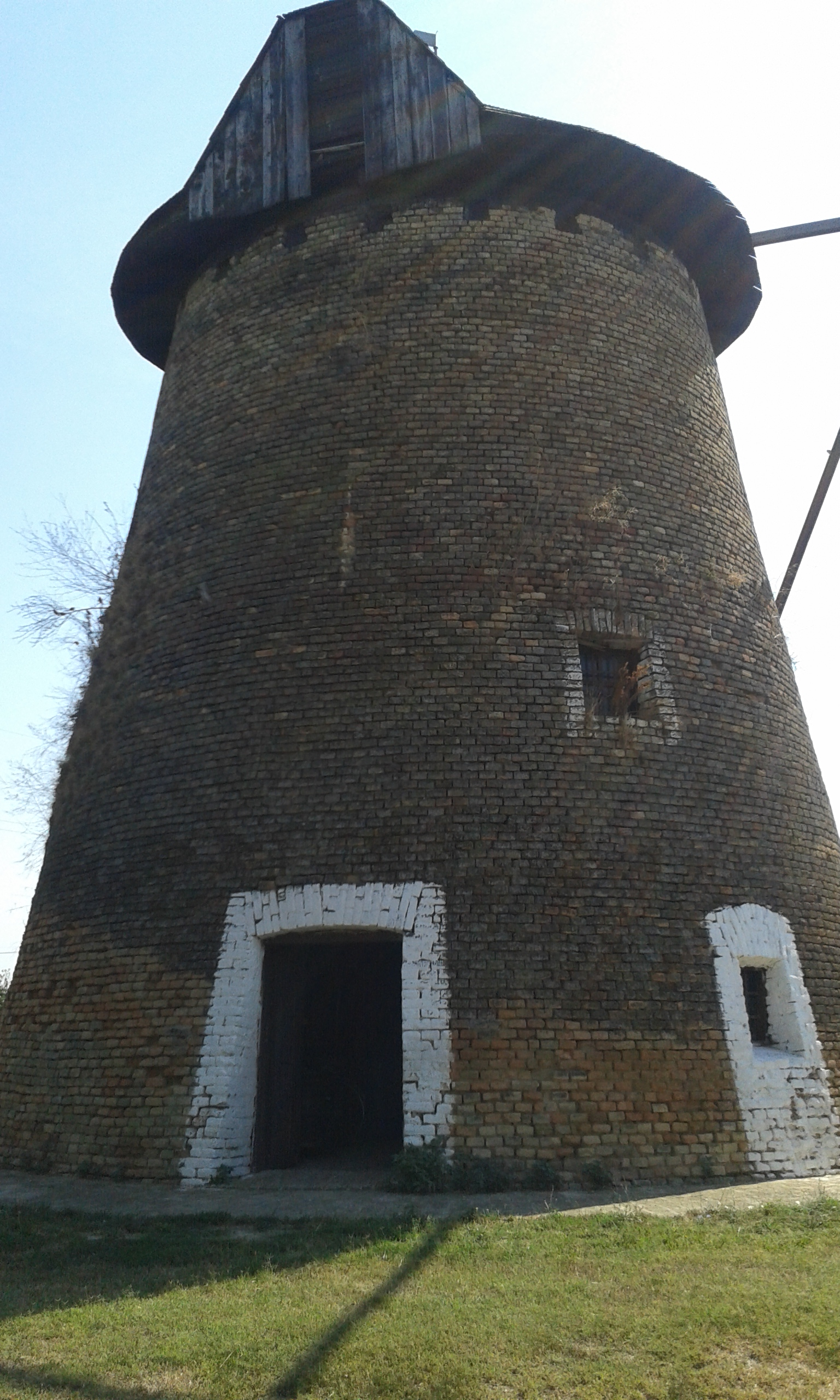 Ветрењача у Чуругу